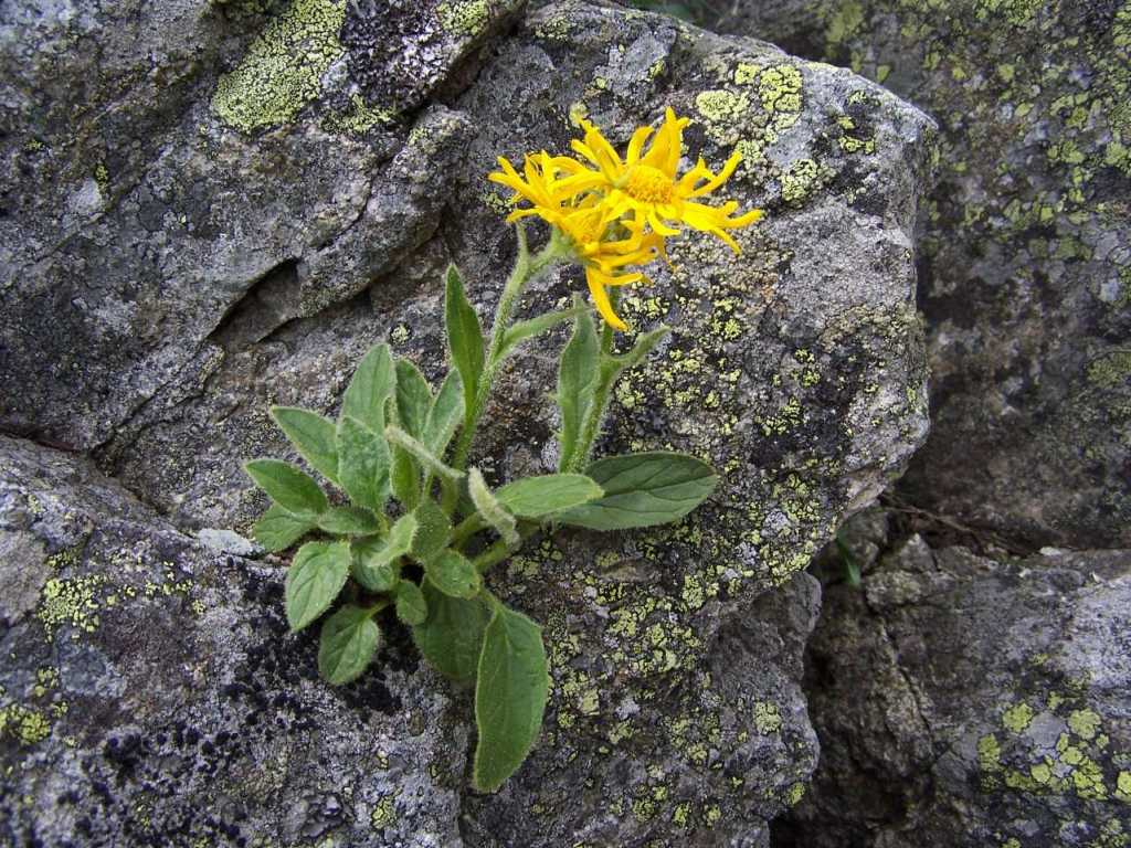 Doronicum clusii (pl. omieg kozłowiec)